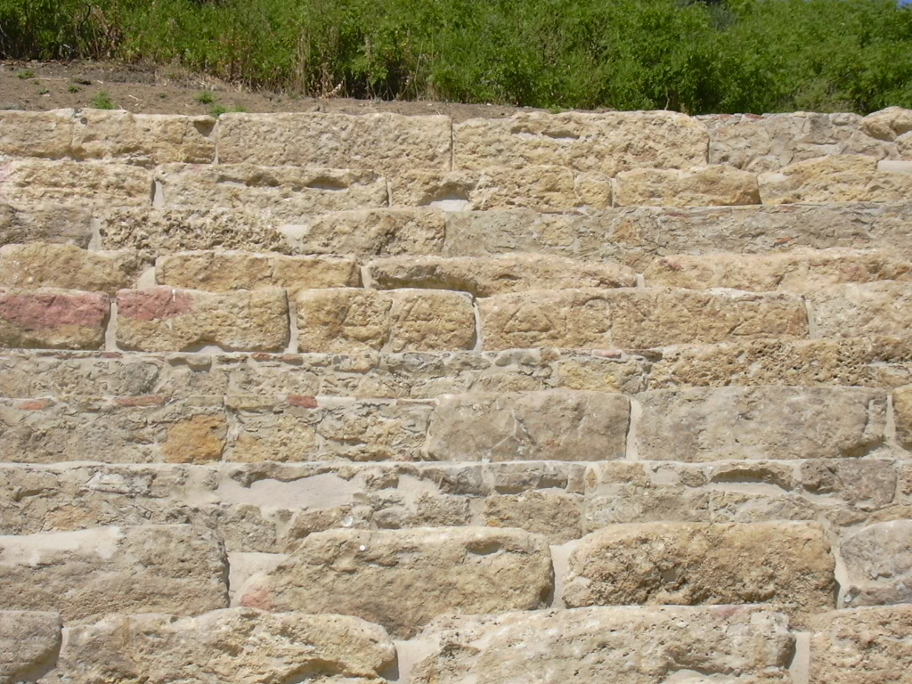 Morgantina:Dedica a Dioniso incisa sull'alzata dei gradoni del teatro